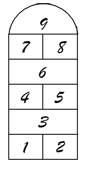 Juego infantil llamado "pon" en Cuba.